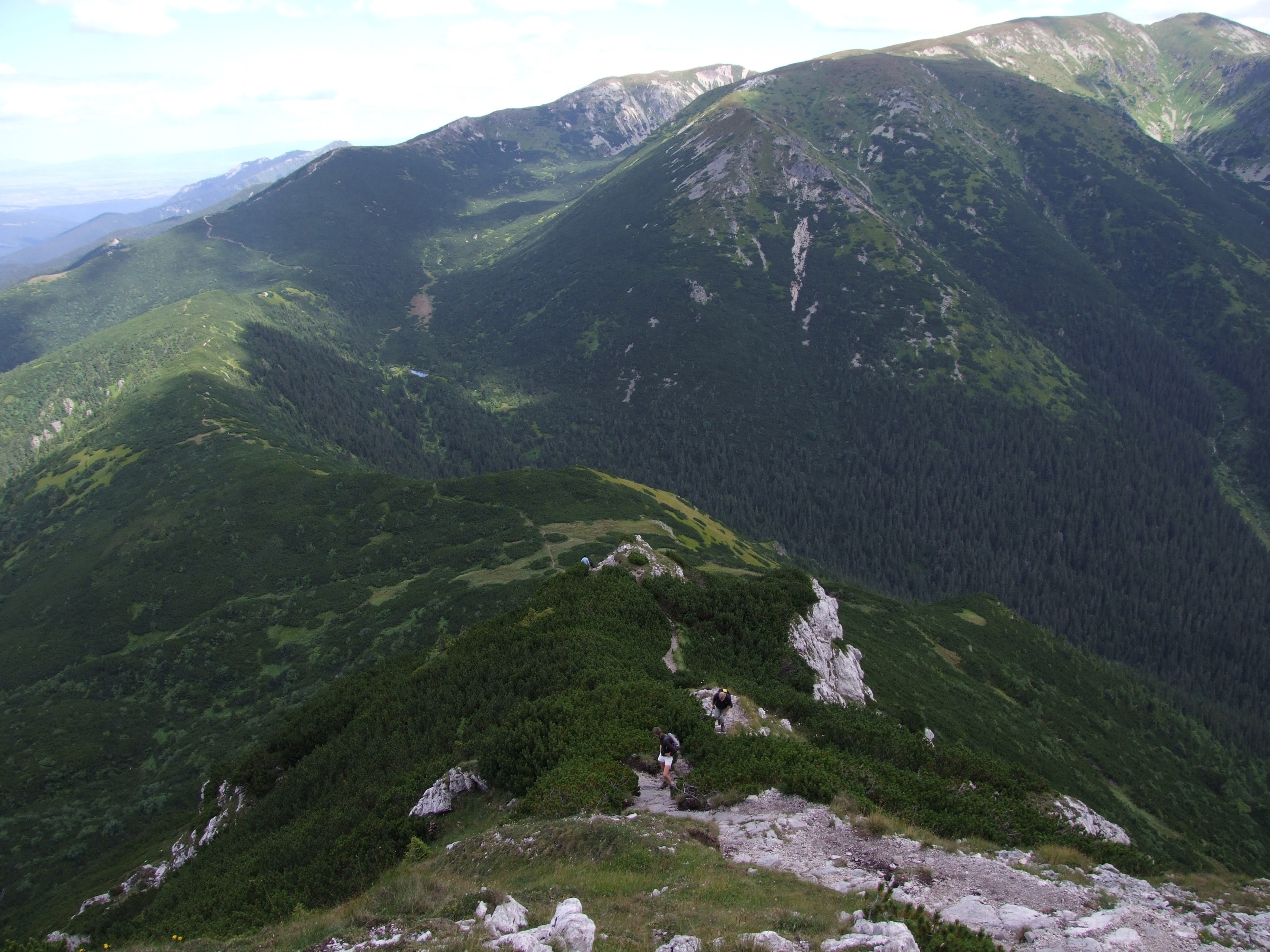 Dolina Bobrowiecka Liptowska, widok z Siwego Wierchu